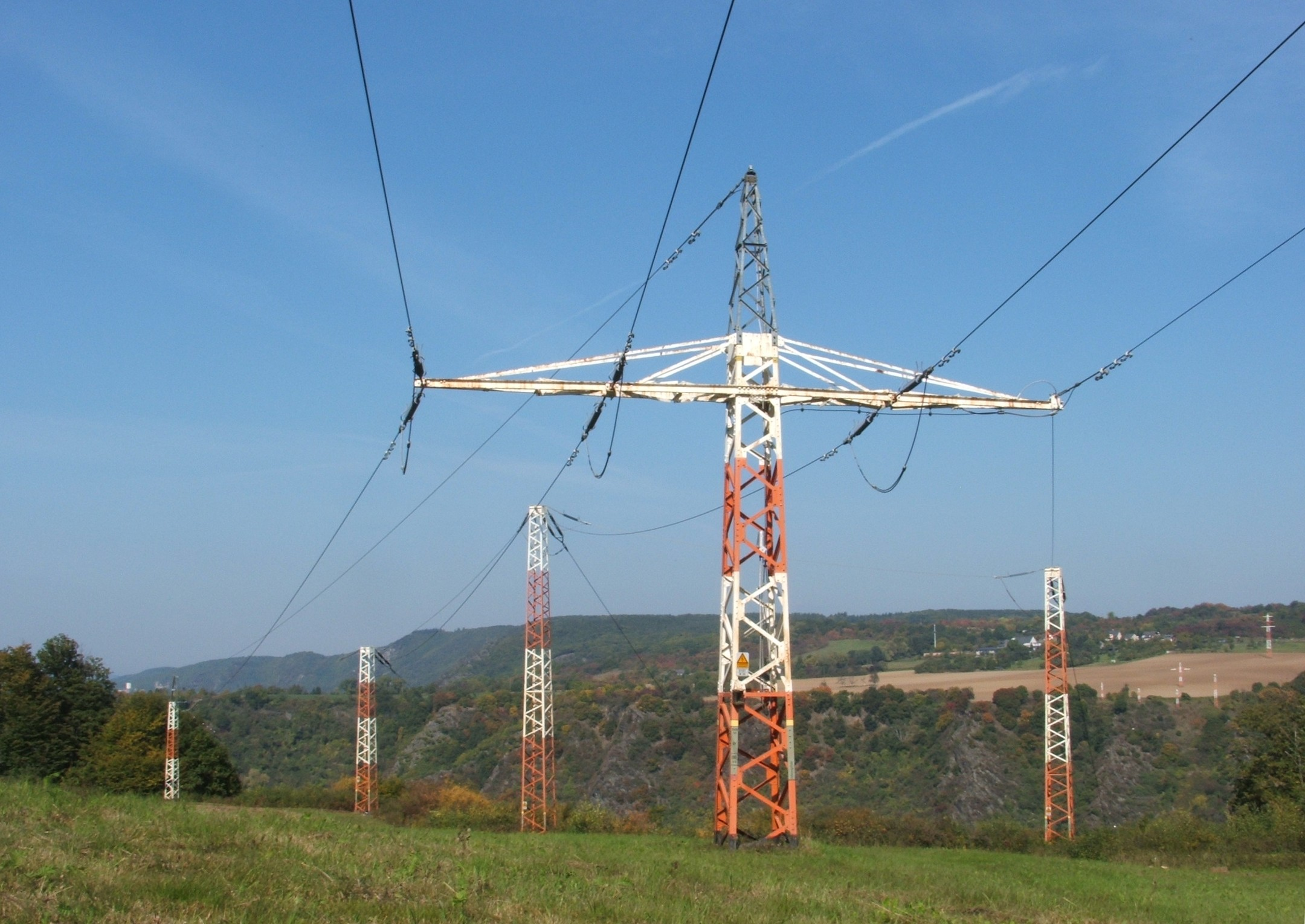 Einzelmasten der linksrheinischen Seite der Rhein-Freileitungskreuzung Hirzenach-Oberkestert in Hirzenach (Boppard), aufgenommen von der linken Rheinseite